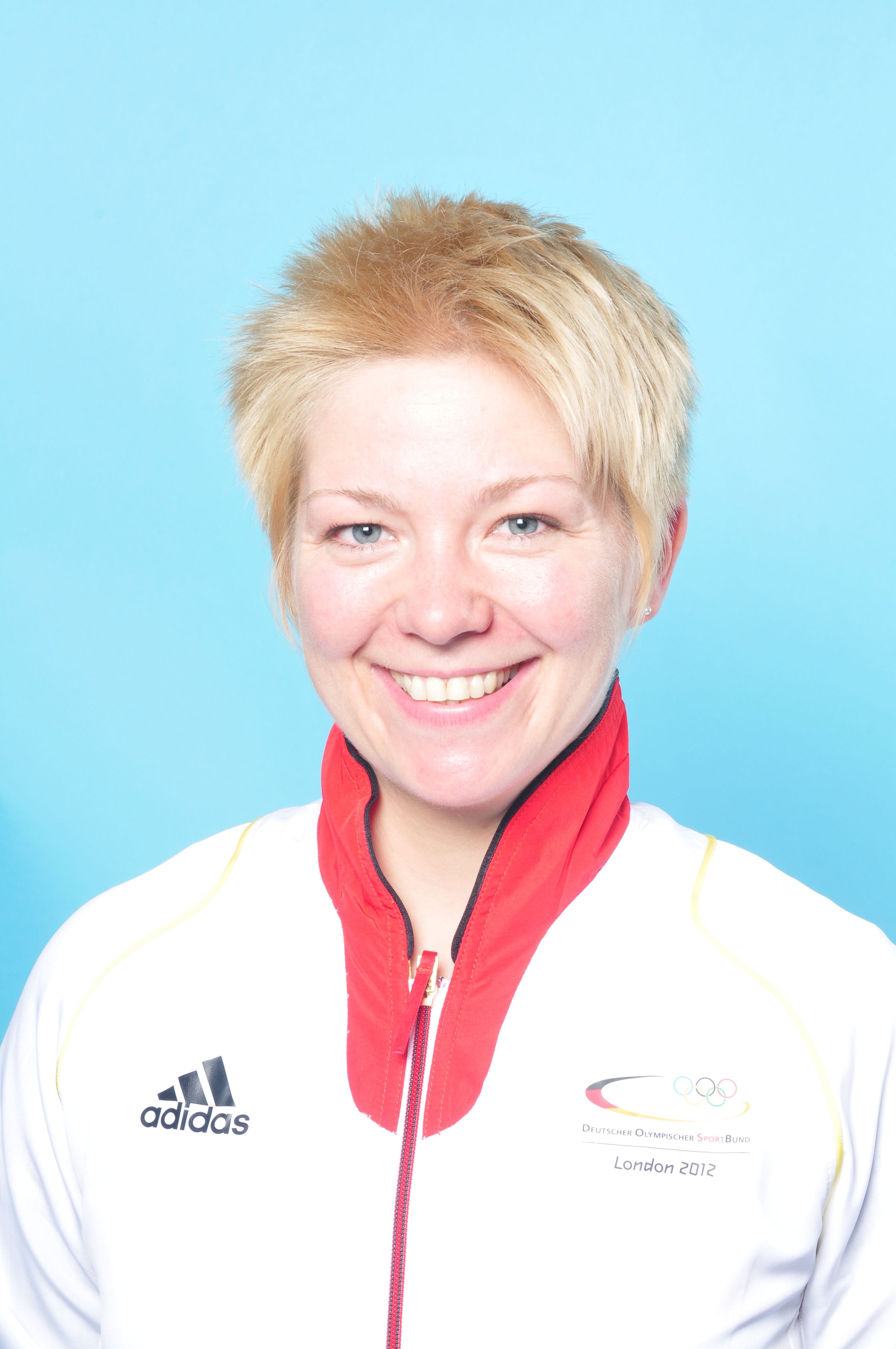 Einkleidung der deutschen Olympiamannschaftam 28. Juni 2012 in Mainz - Olympische Sommerspiele 2012 Cirdan Marcus Cyron Olaf Kosinsky Ralf Roletschek Sven Teschke